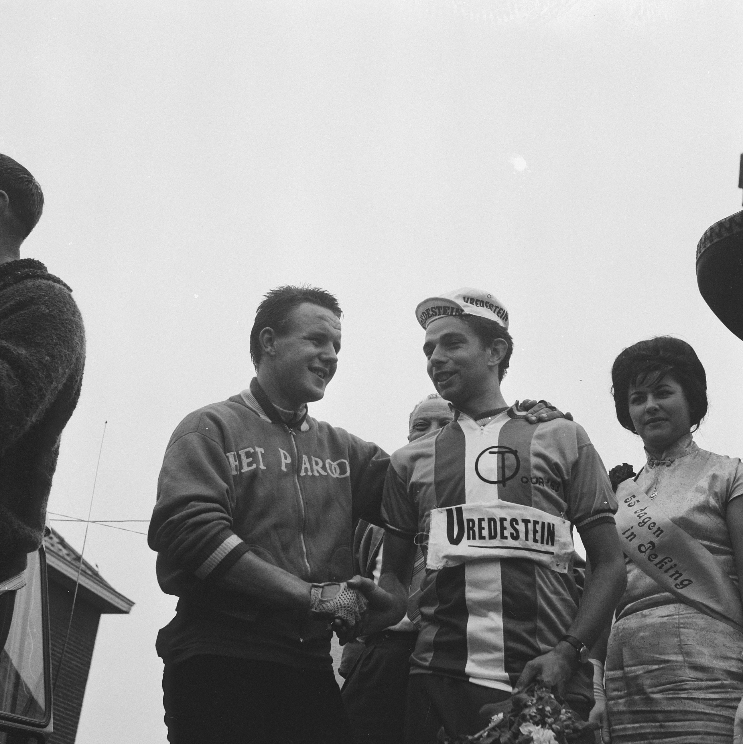 Collectie / Archief : Fotocollectie Anefo Reportage / Serie : [ onbekend ] Beschrijving : Olympia Tour 4e etappe van Heerlen naar Veldhoven. M. Paul Datum : 27 mei 1963 Locatie : Heerlen, Veldhoven Trefwoorden : WIELRENNEN Persoonsnaam : Paul, M. Instellingsnaam : Olympia's Ronde van Nederland Fotograaf : Nijs, Jac. de / Anefo Auteursrechthebbende : Nationaal Archief Materiaalsoort : Negatief (zwart/wit) Nummer archiefinventaris : bekijk toegang 2.24.01.03 Bestanddeelnummer : 915-1997